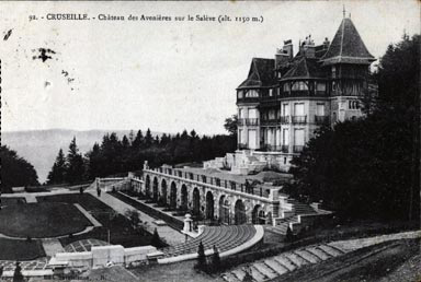 sur le Saleve